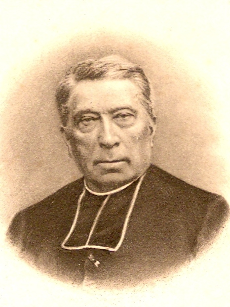 Osmin Gardey (1883 à 1914) - prêtre et curé de Sainte-Clotilde .